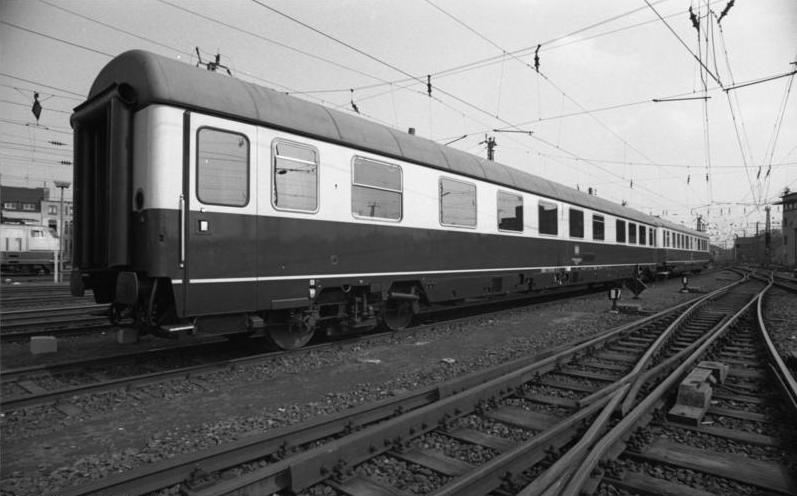 Salon-Zug der Deutschen Bundesbahn (für geplanten DDR-Besuch von Bundeskanzler Helmut Schmidt) [Bundesbahnsonderwagen, alt + neu, in Köln]